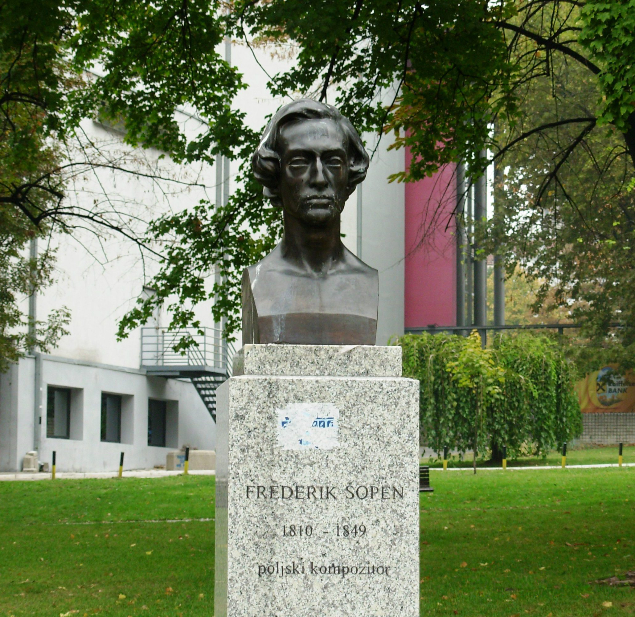 Фредерик Шопен у парку Мањеж, Београд. Сликао Голдфингер